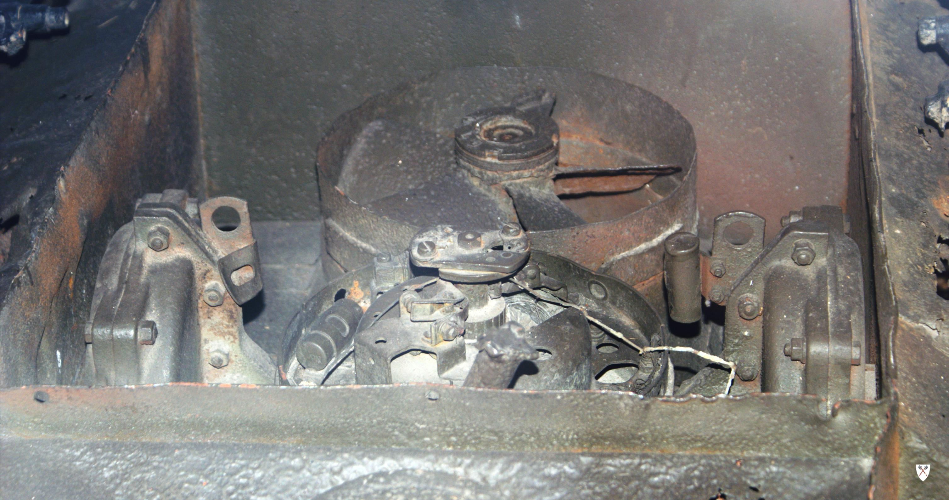 Silnik Goliata w Pomorskim Muzeum Wojskowym.